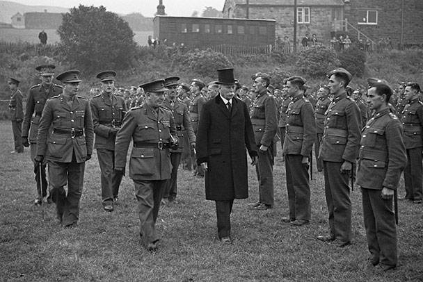 Teitl Cymraeg/Welsh title: Gorymdaith y Ffiwsaliwyr Cymreig yn y Drenewydd Ffotograffydd/Photographer: Geoff Charles (1909-2002) Nodyn/Note: The Earl of Powis inspecting the troops. Dyddiad/Date: October 7, 1939. Cyfrwng/Medium: Negydd / Negative Cyfeiriad/Reference: (gcc01039) Rhif cofnod / Record no.: 3472130 Rhagor o wybodaeth am gasgliad Geoff Charles yn Llyfrgell Genedlaethol Cymru Ceir mwy o ffotograffau o Gymru a'r Gororau adeg yr Ail Ryfel Byd ar wefan .uk More information about the Geoff Charles Collection at the National Library of Wales More photographs of Wales and the English border during the Second World War can be found at .uk